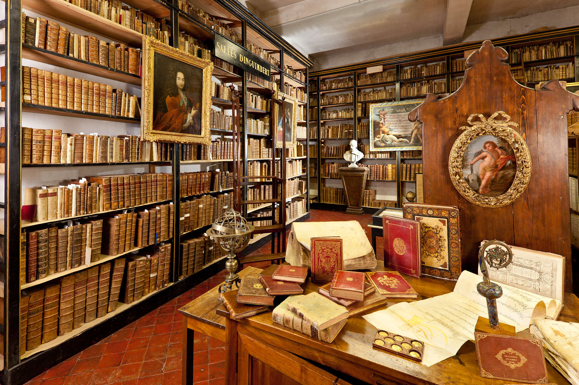 bibliothèque Inguimbertine, manuscrits, reliures, médailler, Collection Peiresc, salle d'Inguimbert, cabinet de curiosités